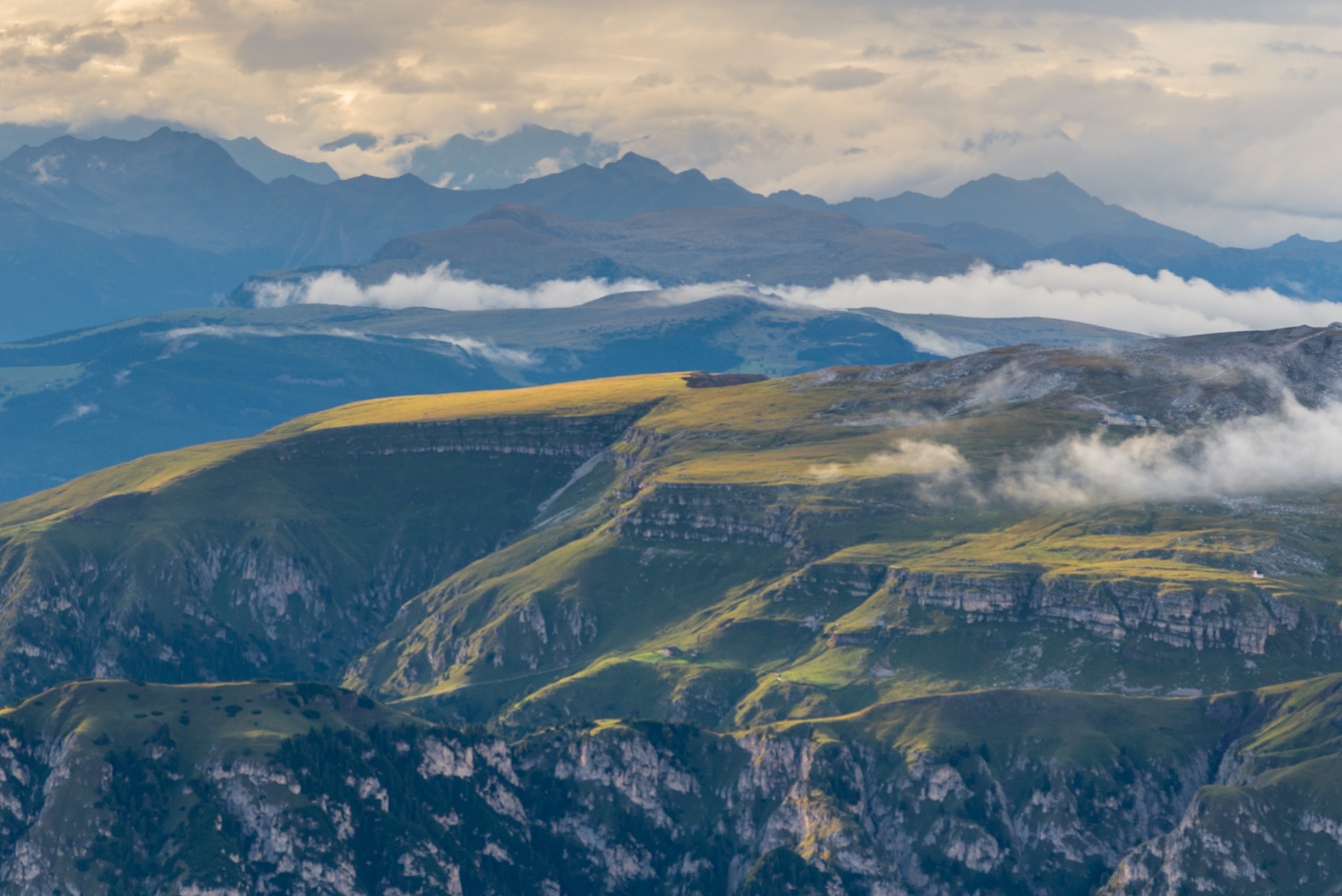 Parco naturale dello Sciliar-Catinaccio, Massiccio dello Sciliar